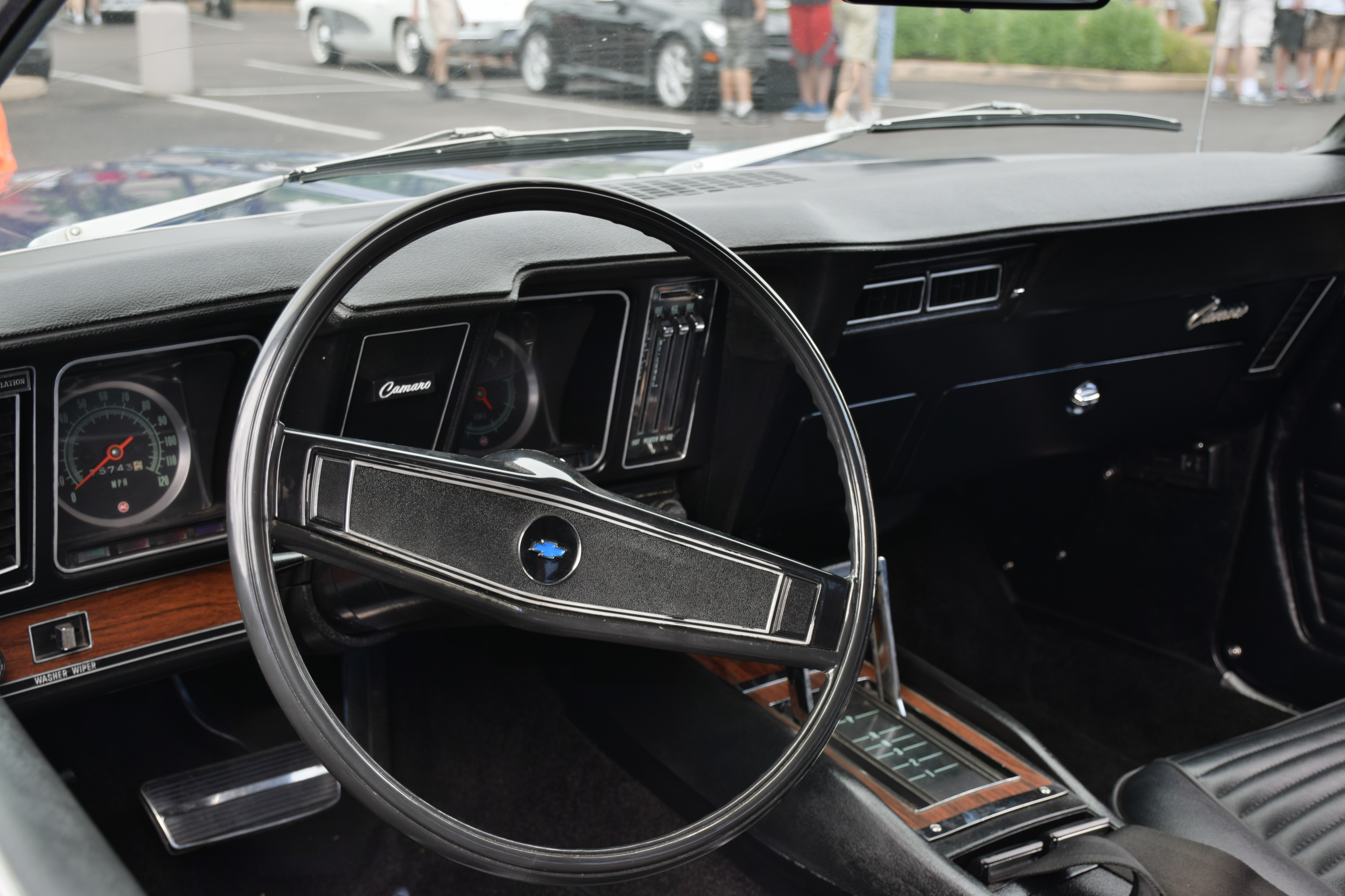 Chevrolet Camaro